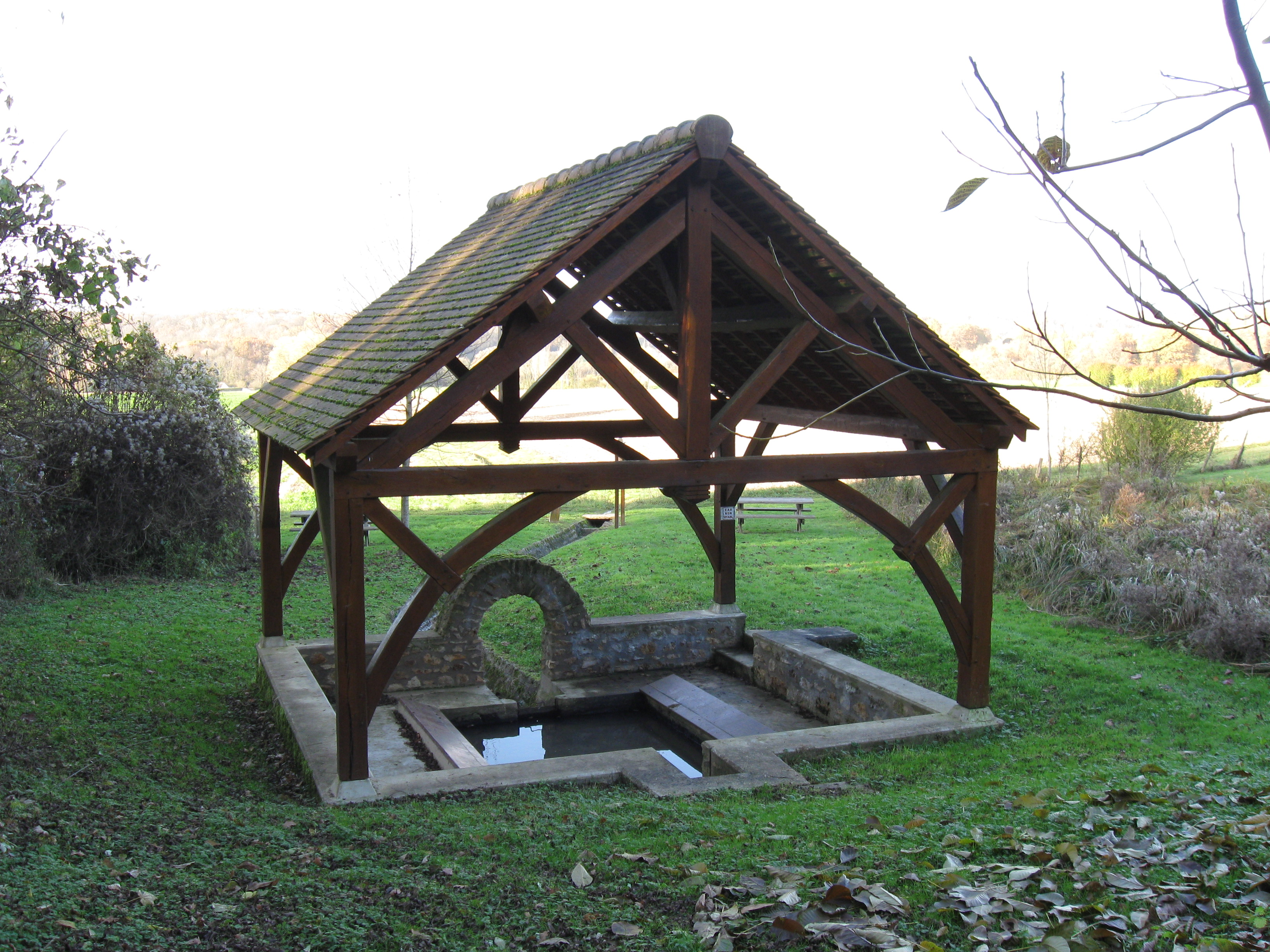 Ancien lavoir restauré. (Seine-et-Marne, région Île-de-France).